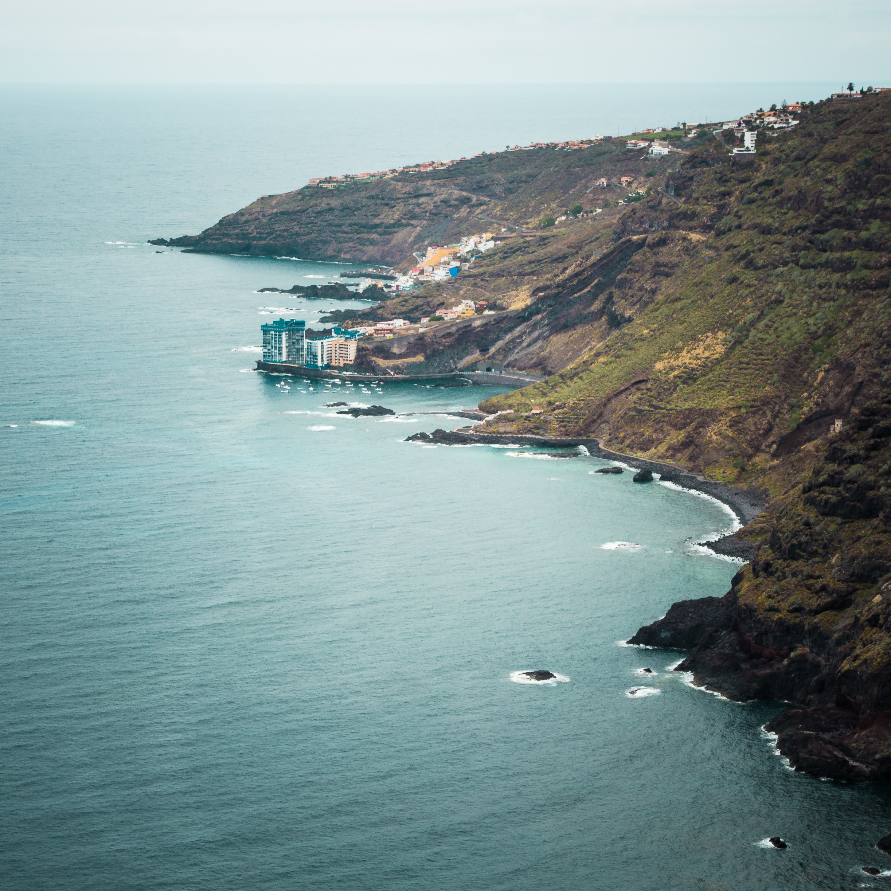 Vista de la localidad de Mesas del Mar desde el Parque de Los Lavaderos en El Sauzal